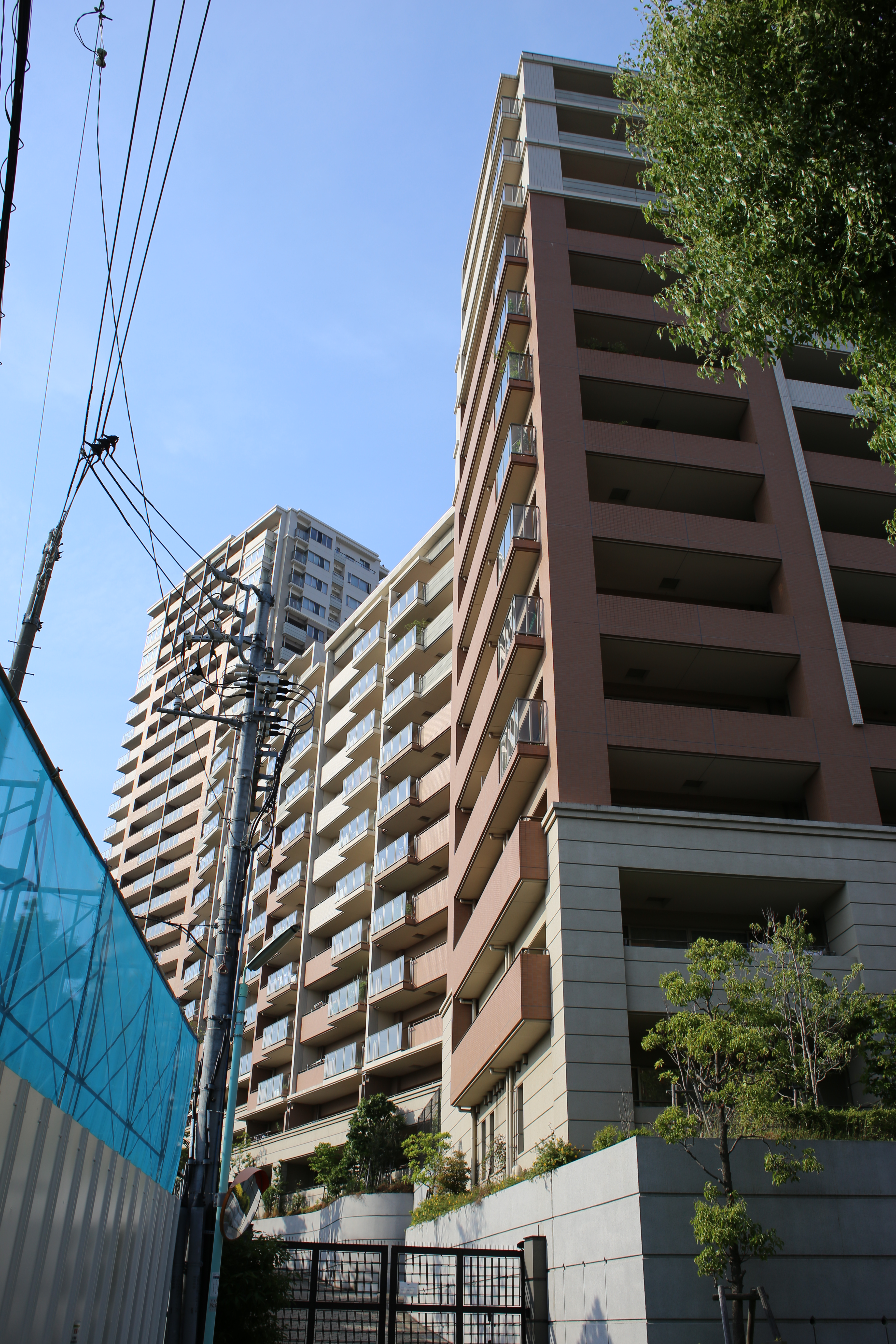 名古屋市千種区星が丘山手のグランドメゾン星が丘山手を南側公道より撮影